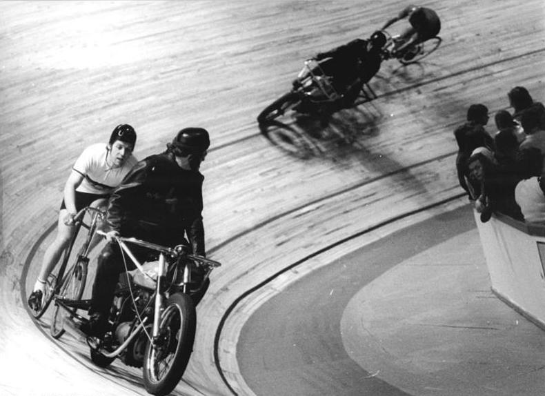 Karl Kaminski, Magnus ADN-ZB Katscherowski 29-12-74 Berlin:Kaminski gewann Steherrennen - Am dritten Renntag der Winterbahnsaison in der Berliner Werner-Seelenbinder-Halle war am 29.12.74 DDR-Meister Karl Kaminski (Motor Optima Erfurt-vorn) beim Sterherrennen über 30 km (zwei Läufe zu je 15 km) mit seinem Schrittmacher Georg Sternberg (Rotation Berlin) erfolgreich. Magnus (Wismut Karl-Marx-Stadt-im Hintergrun) hinter Lass (Berlin) erkämpfte mit 10 m Rückstand Platz zwei.